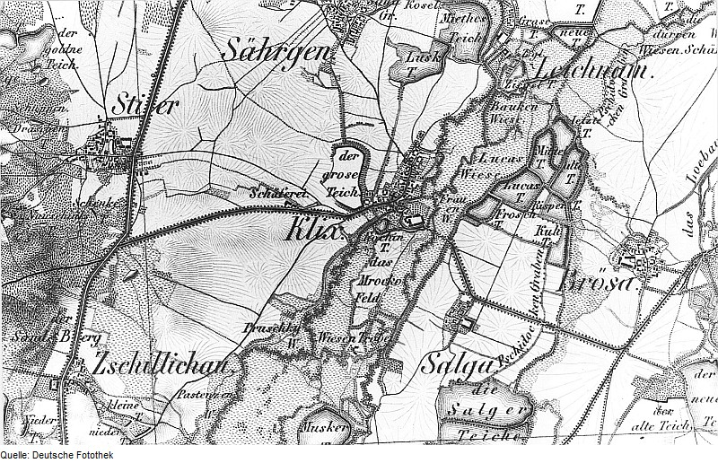 Original image description from the Deutsche Fotothek Großdubrau-Klix. Oberreit, Sect. Bautzen, 1844/46